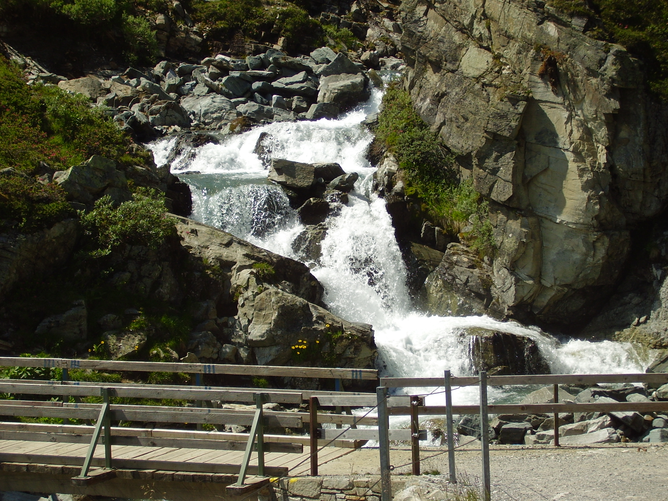 Brücke über den Wasserfall des Klostertaler Baches kurz vor der Einmündung in den Silvretta-Stausee.